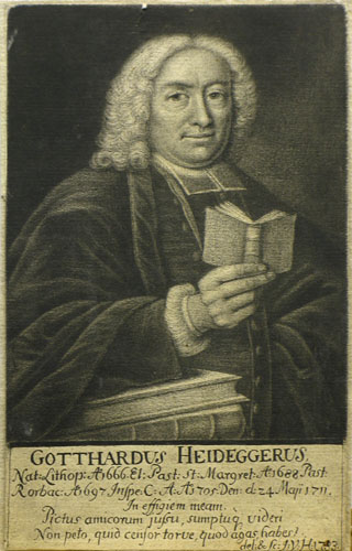 Portrait von Gotthard Heidegger (1666–1711).